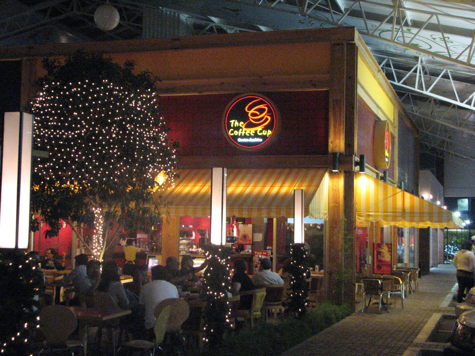 Restaurante The coffee Cup en San Salvador.